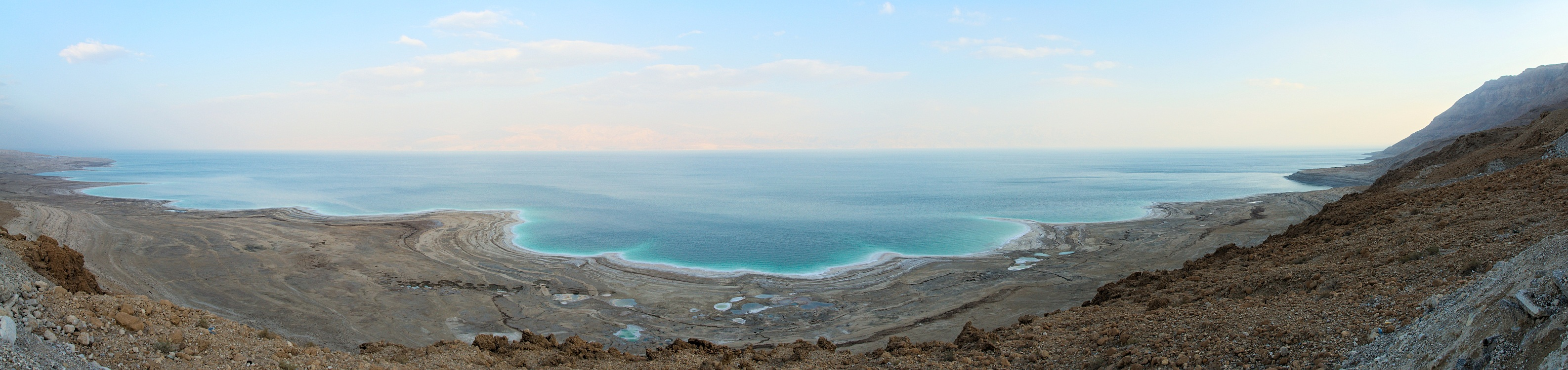 Panoramablick auf das Tote Meer